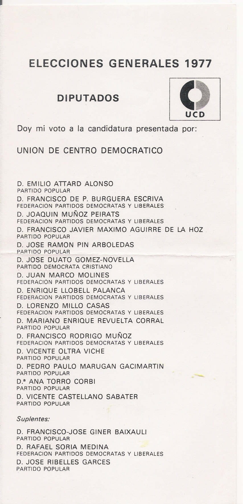 Candidatura al Congreso de la Unión de Centro Democrático por Valencia en 1977. Junto a los nombres de los candidatos, figuran los partidos a os que pertenecen.